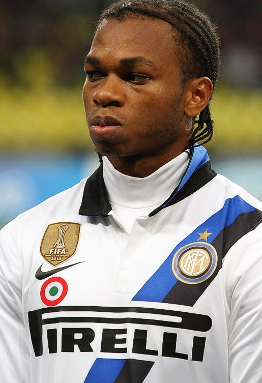 Joel Chukwuma Obi